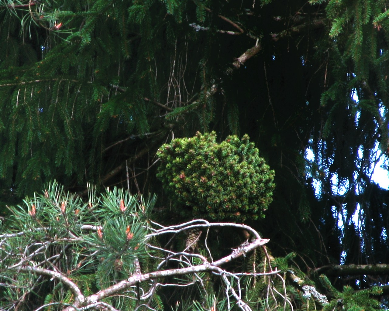 Hexenbesen einer Fichte. Im Vordergrund der Ast einer nahe stehenden Kiefer.